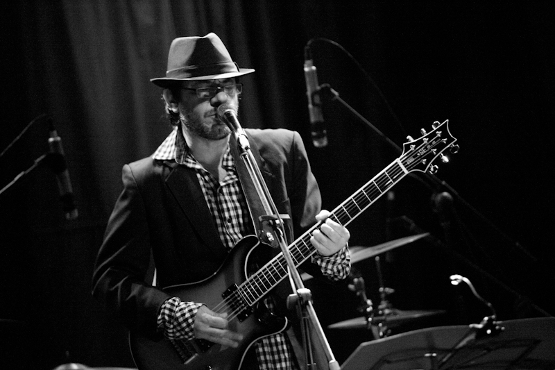 מאיר בנאי